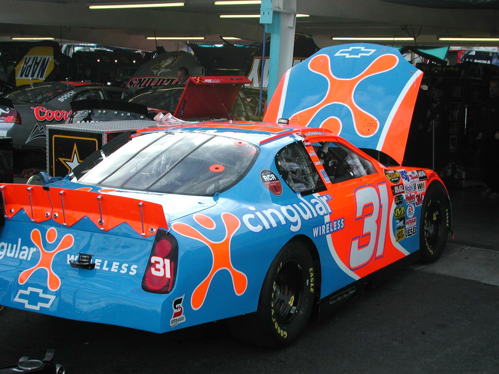 Robbie Gordon #31